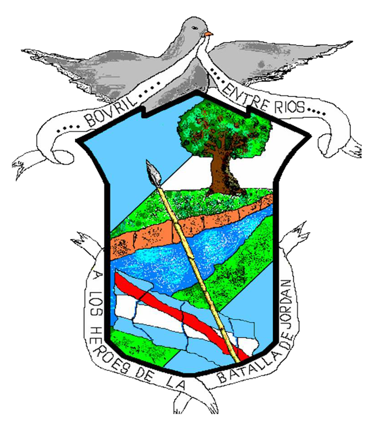 Bovril escudo